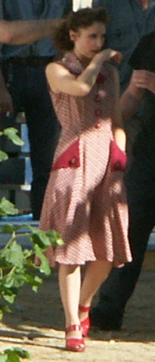 Elsa Lunghini pendant le tournage du film trois jours en juin.